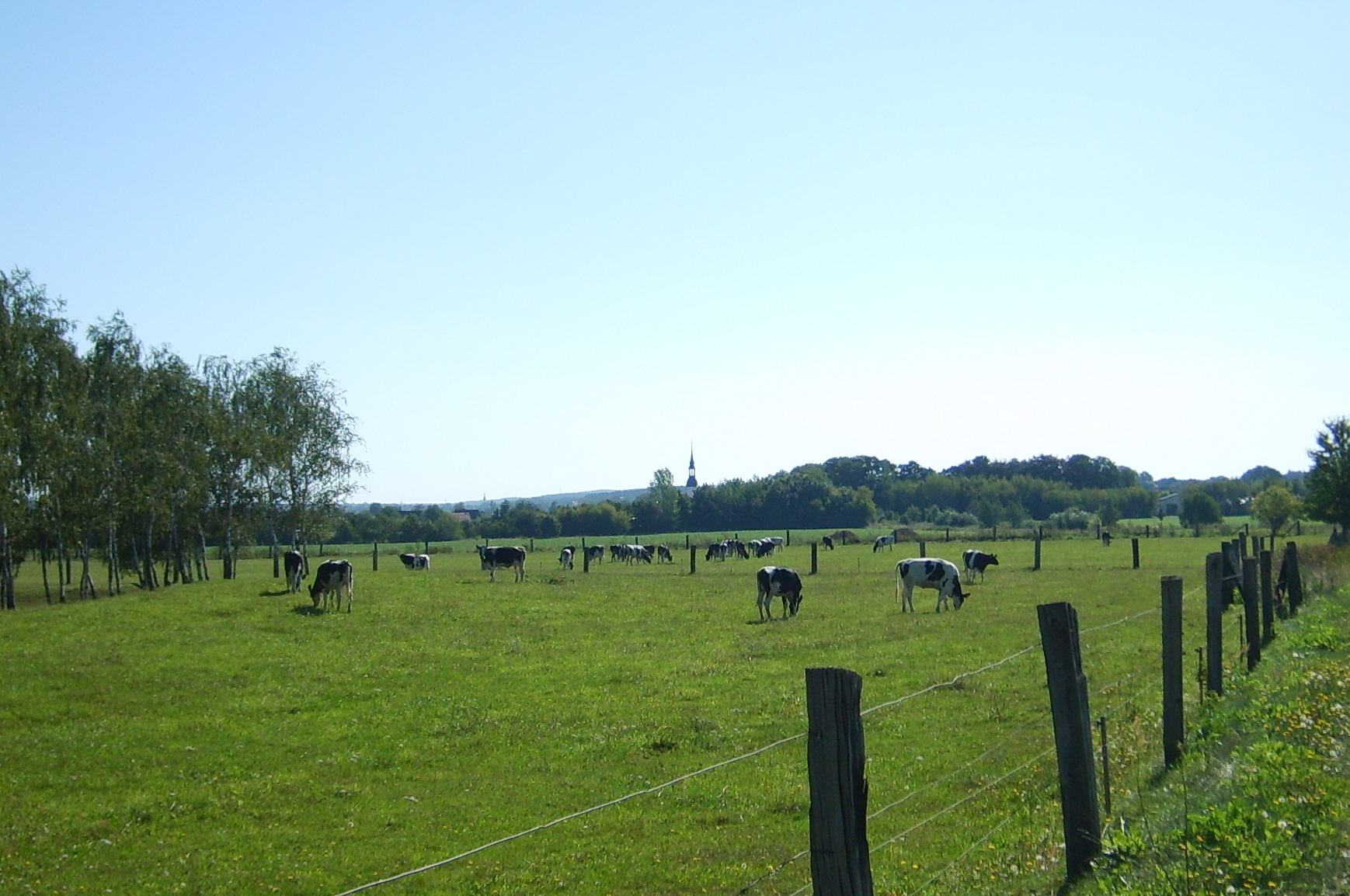 Hirschfeld